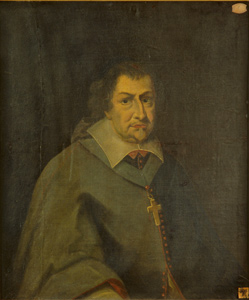 Jacques Raoul de La Guibourgère, maire de Nantes, évêque